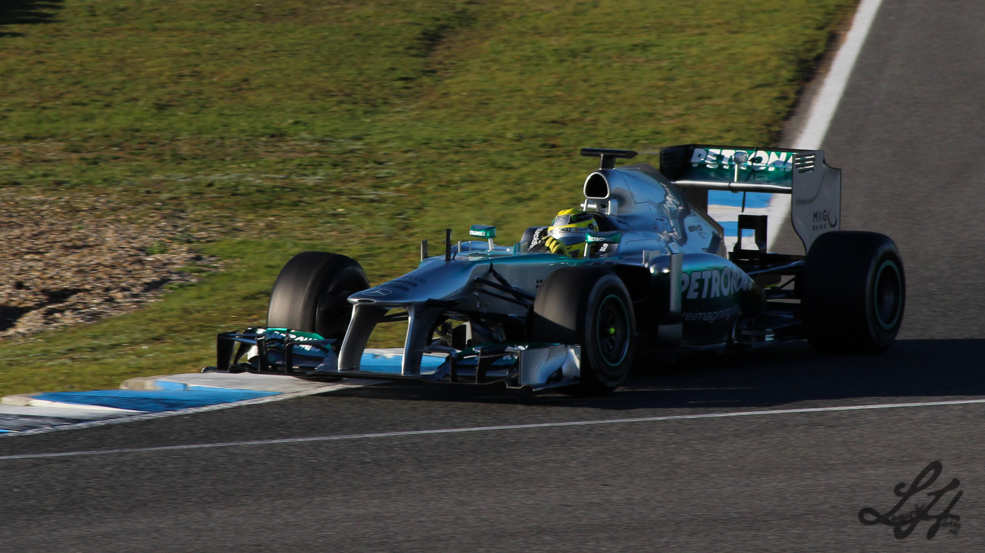 Fotos hechas el 7 de Febrero de 2013 en el circuito de Jerez, plena pre-temporada de F1. Would you like to follow me on Instagram and Twitter?